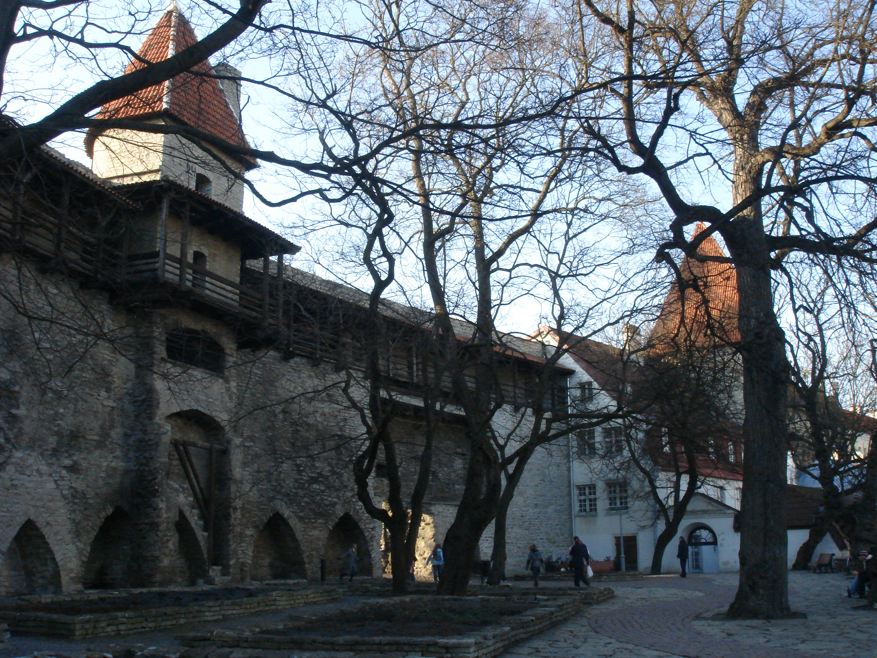 Таллин, Сад датского короля (Tallinn, Danish King's Garden)